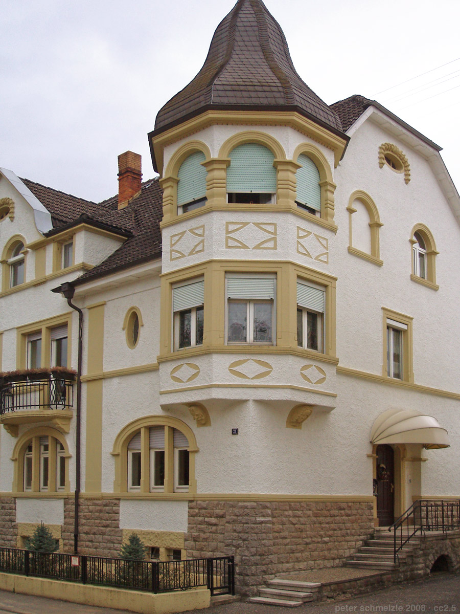 Repräsentatives historisches Wohngebäude in Sinsheim-Steinsfurt